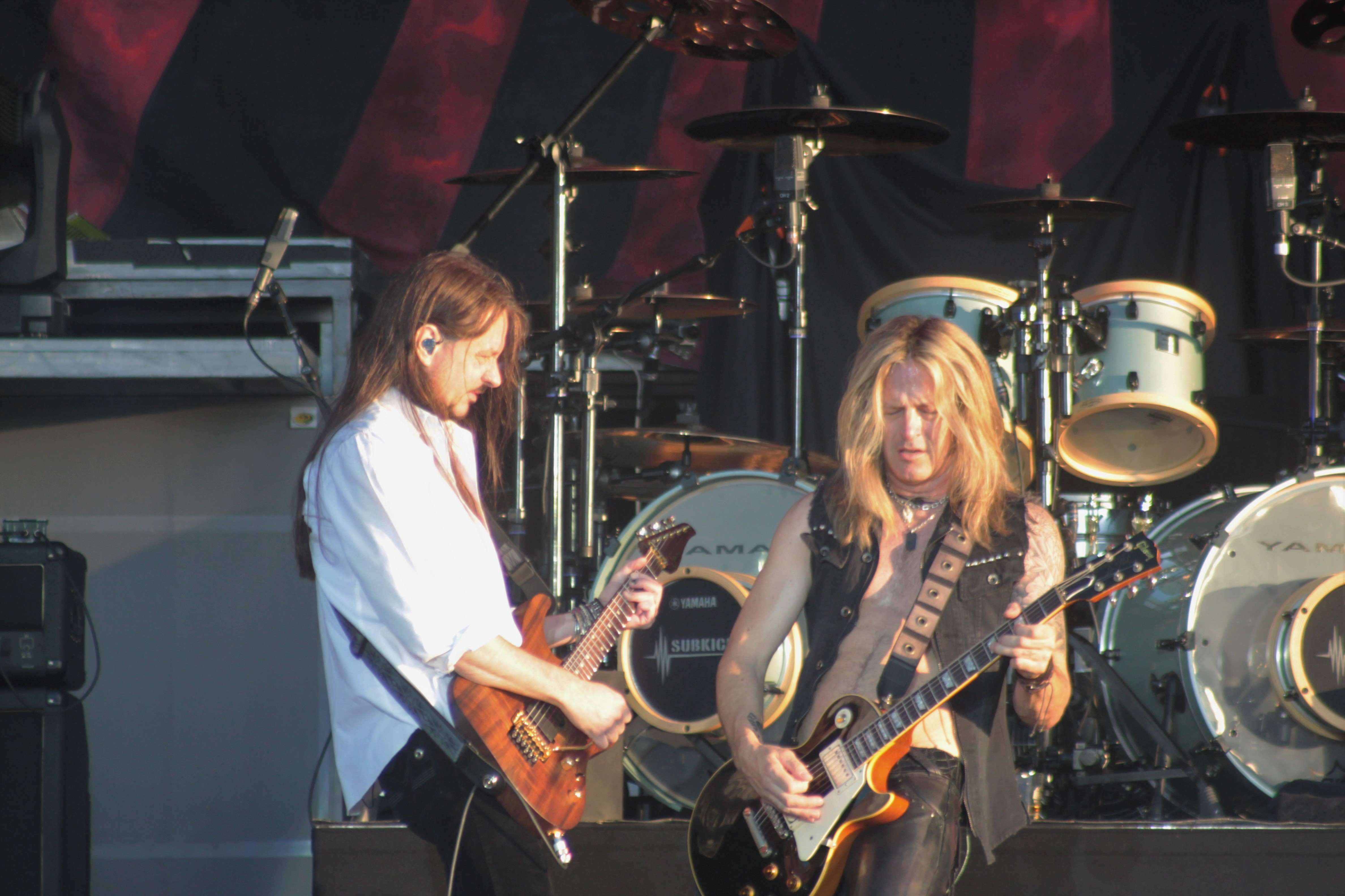 Reb Beach, Doug Aldrich, Whitesnake, Hellfest 2013, Fr-44-Clisson.